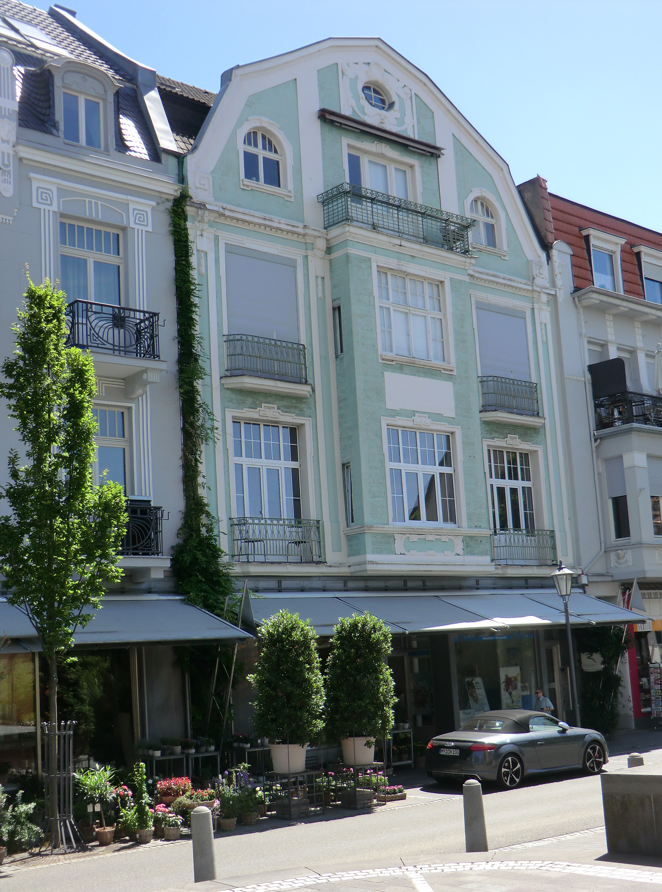 Adolf Deusters Wohnhaus in Bad Neuenahr von 1953 bis 1975, Telegrafenstraße 11